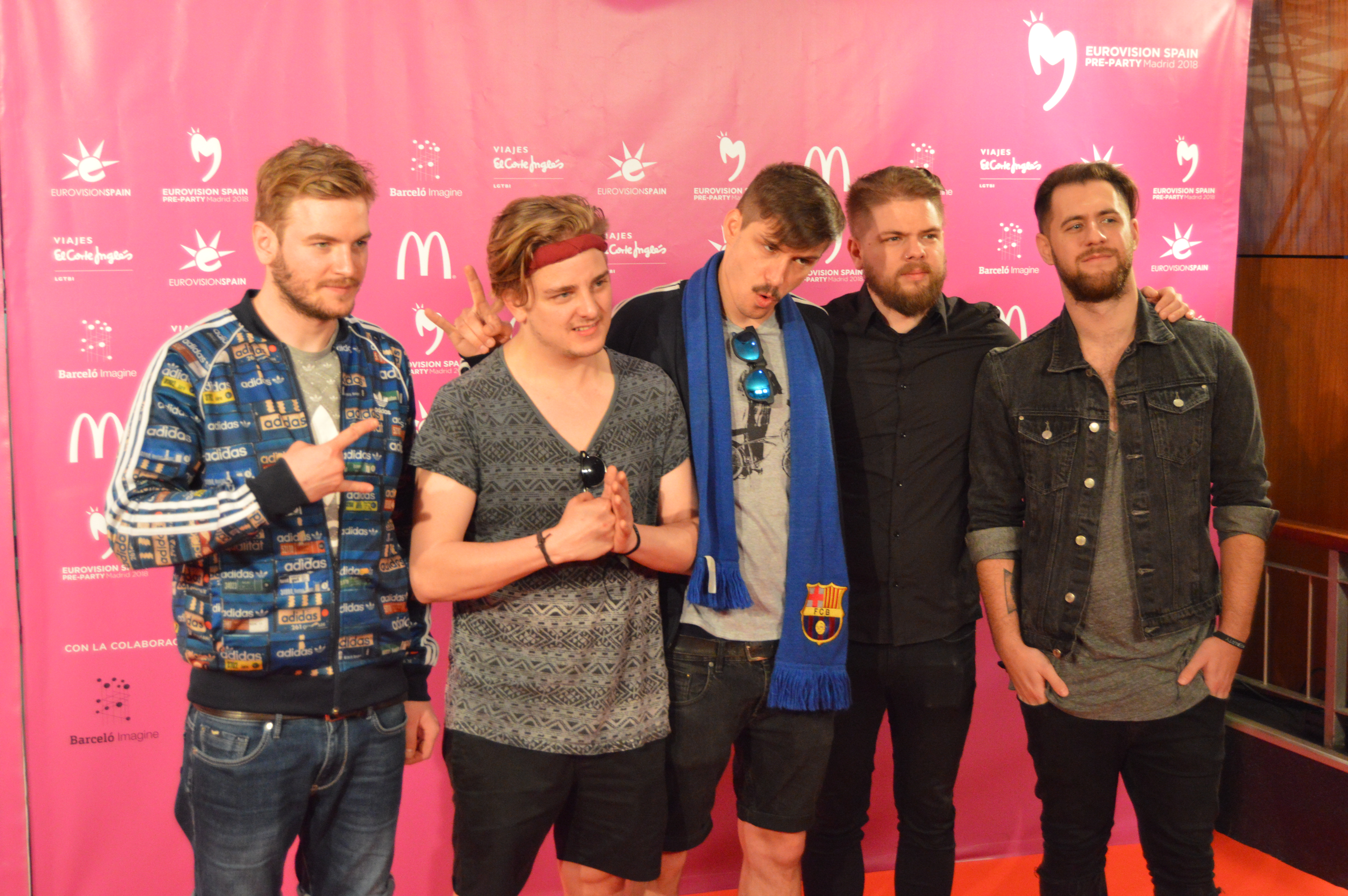 El grupo de rock AWS posan ante los medios en la Eurovision Spain PreParty en Madrid (Abril 2018)